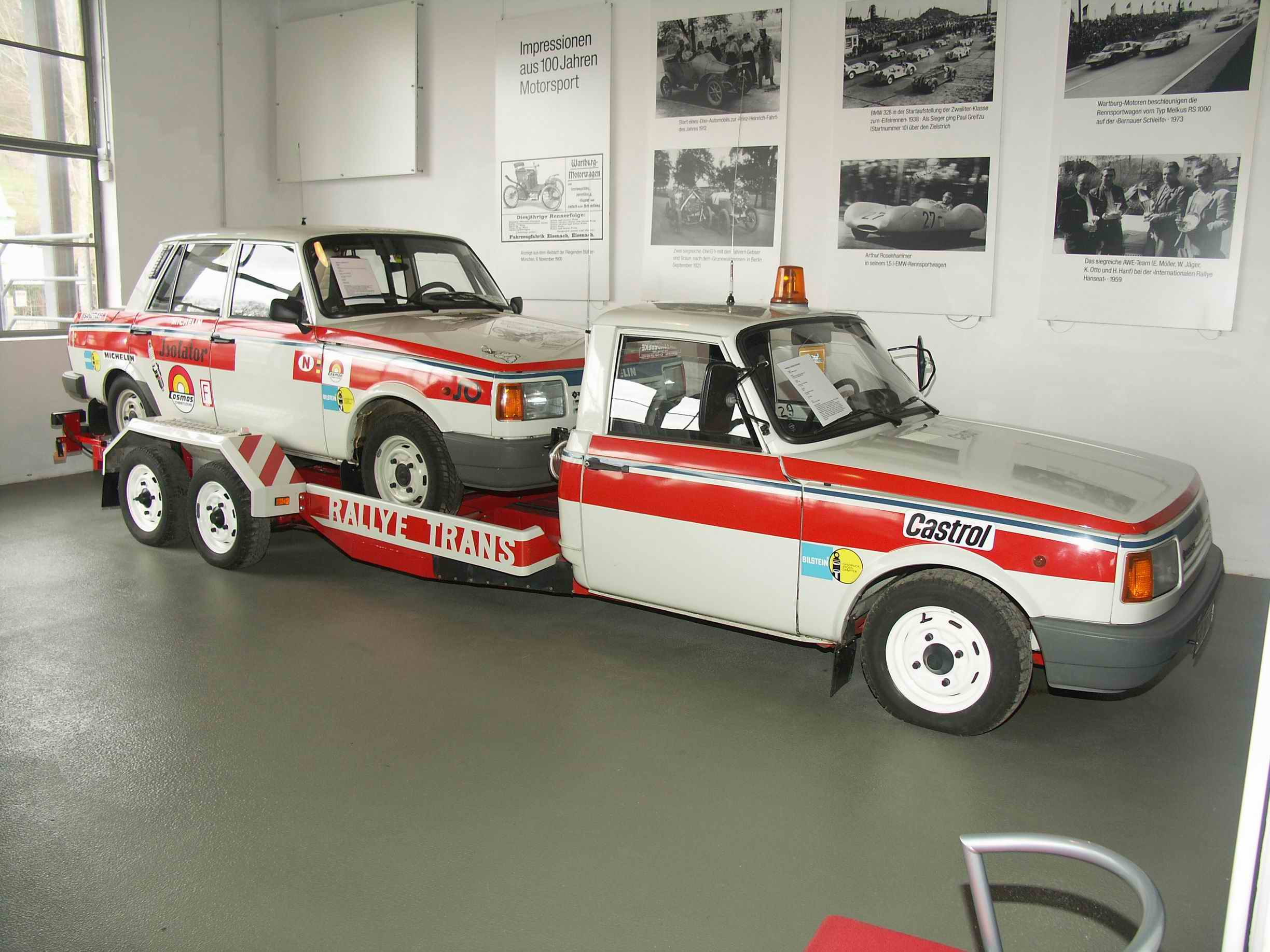 Wartburg Rally Trailer mit Wartburg Rally 1.3 im AWE Museum Eisenach